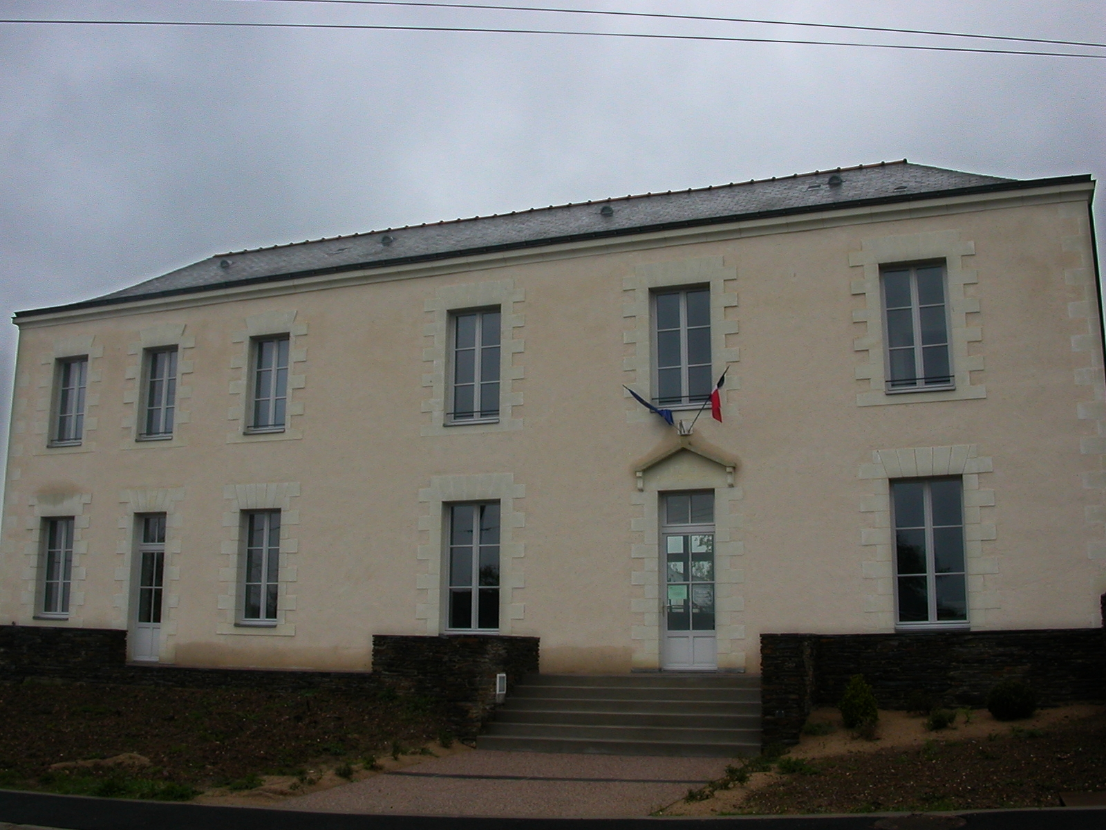 Mairie de Puceul